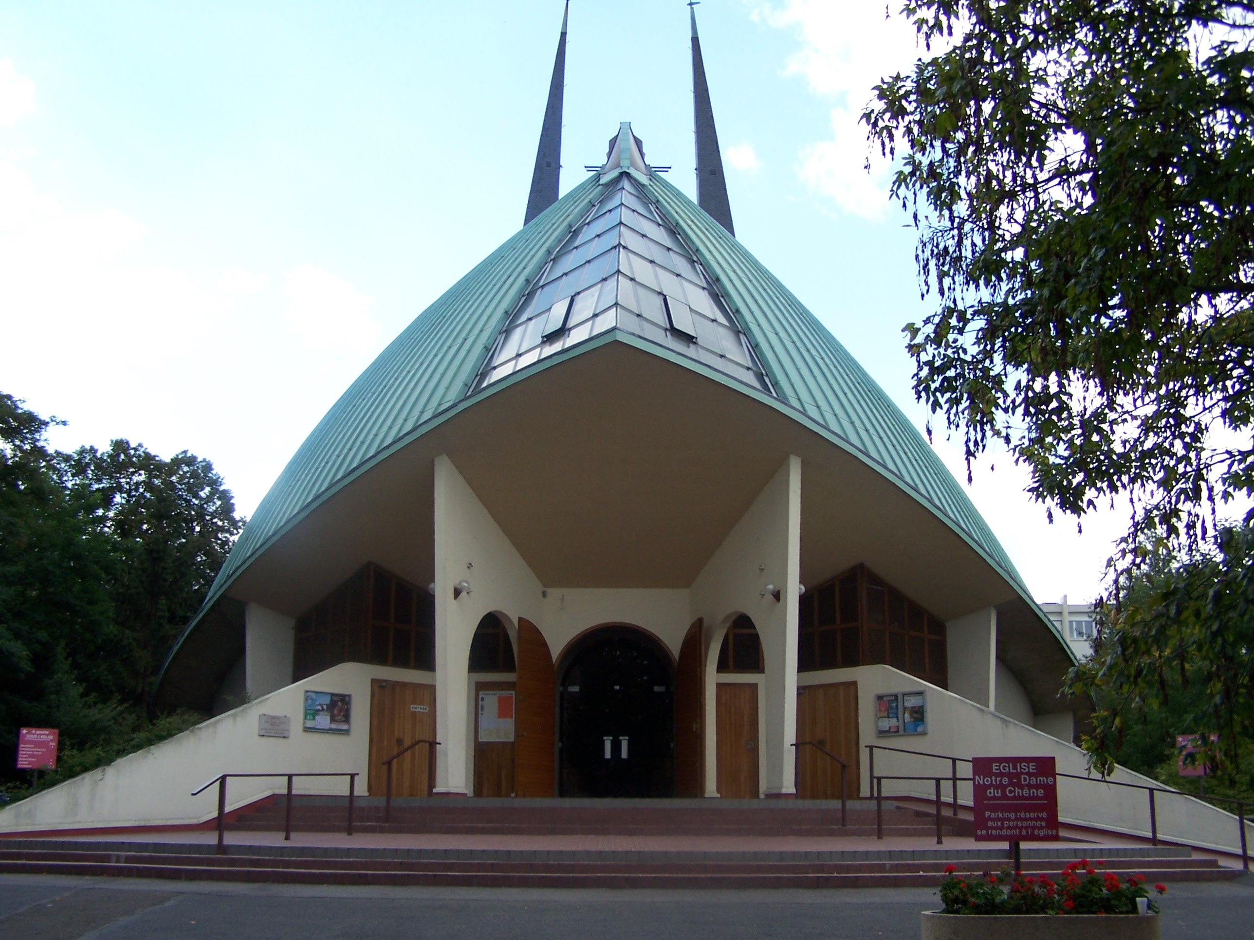 Église Notre-Dame-des-Chênes de Viroflay (Yvelines, France)